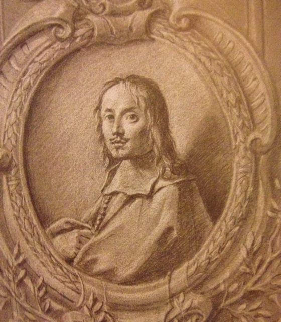 Ritratto eseguito da Luigi Garzi